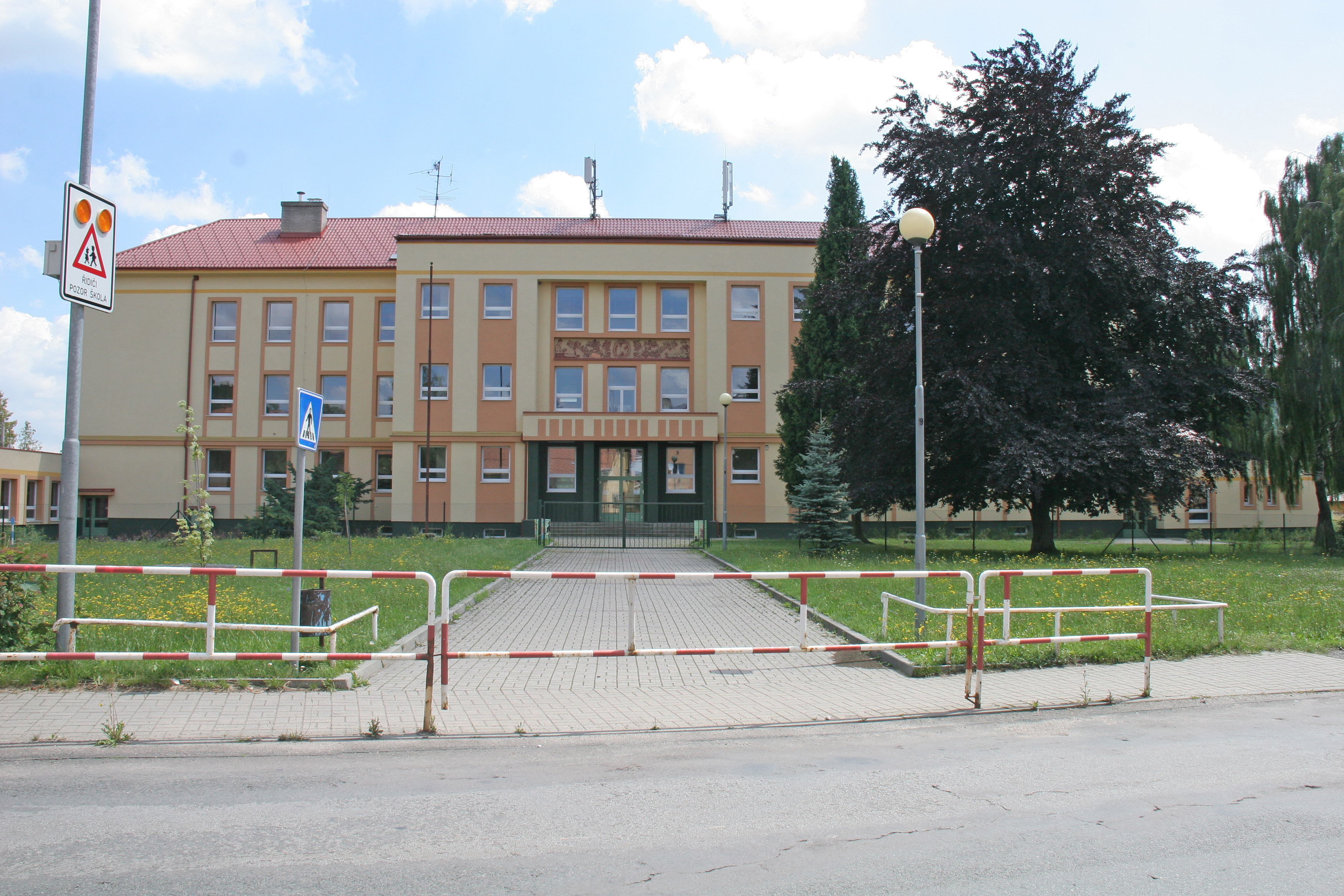 Prachovice škola